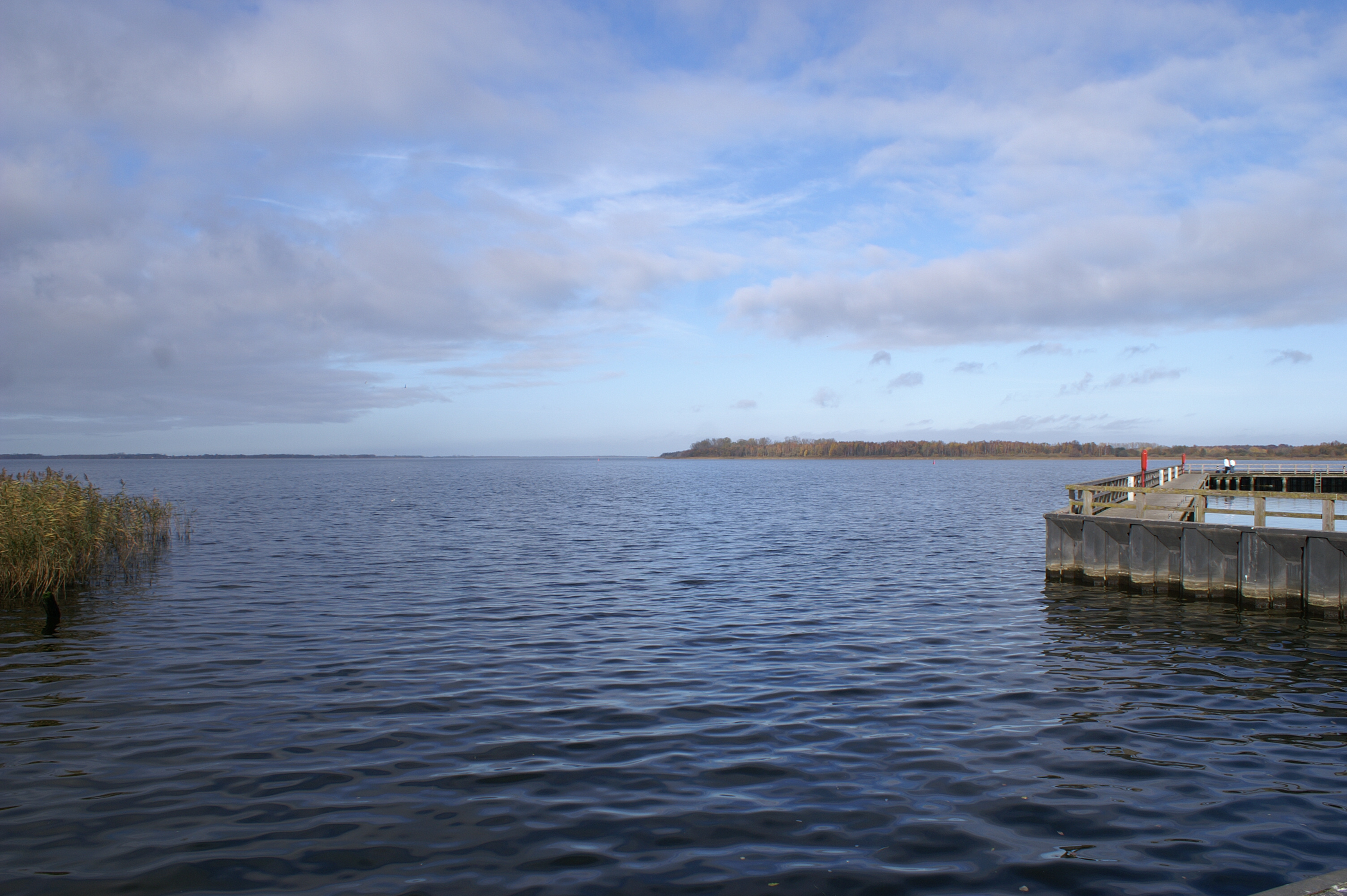 Saaler Bodden (Ribnitzer See) von Ribnitz nahe der Mündung des Klosterbachs aus gesehen